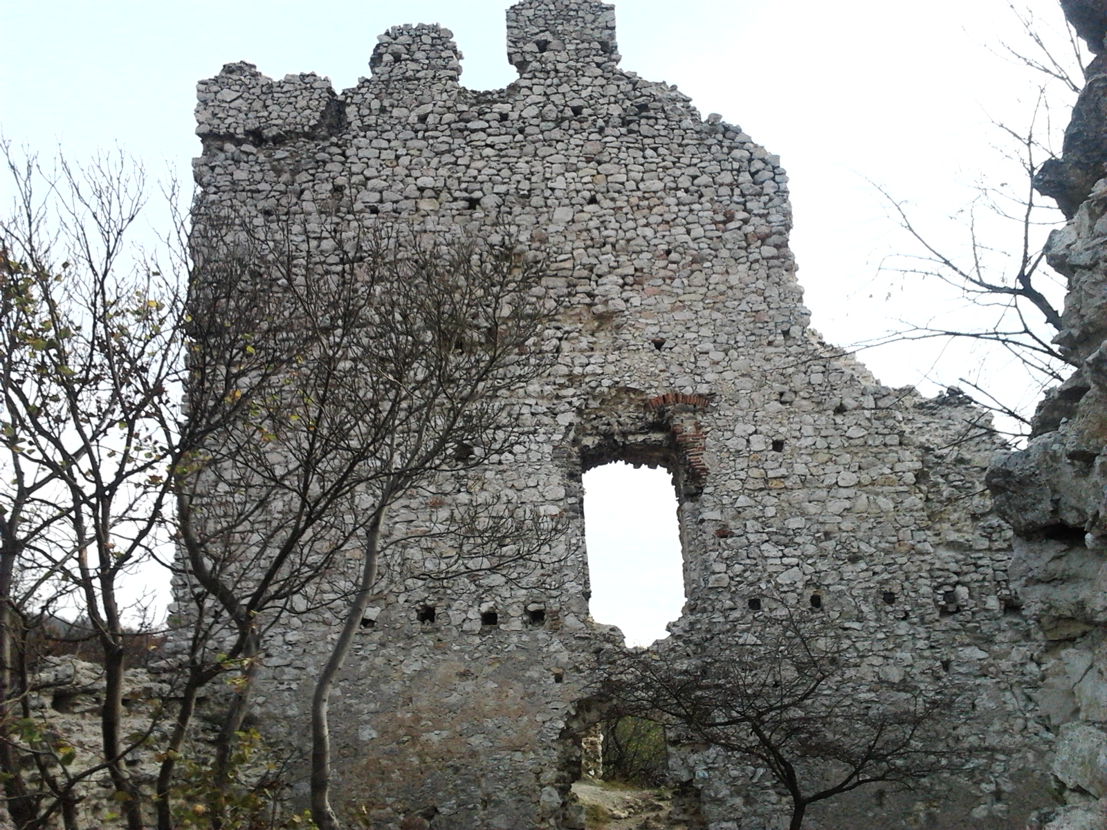 A Vitányvár egyik épen maradt falának képe a Vértes egyik ormán.